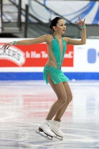 Елизавета Туктамышева финале Гран-при по фигурному катанию сезона 2011-2012